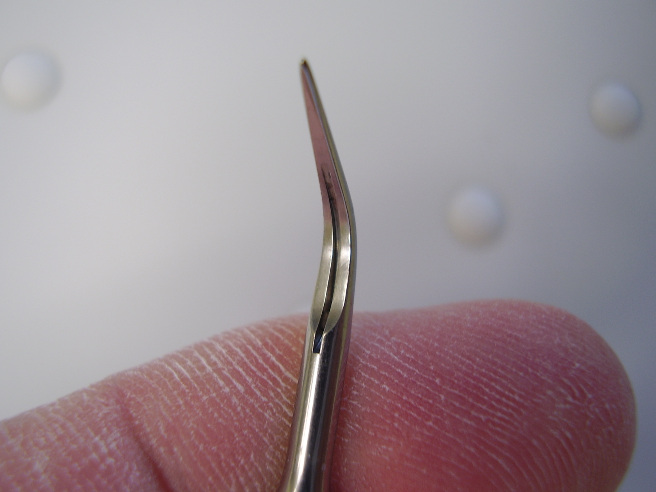 Dental instrument to remove Calculus